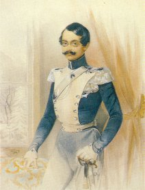 Adolphe, Grand Duke of Luxembourg Портрет герцога Адольфа Нассауского в интерьере у окна. 1844